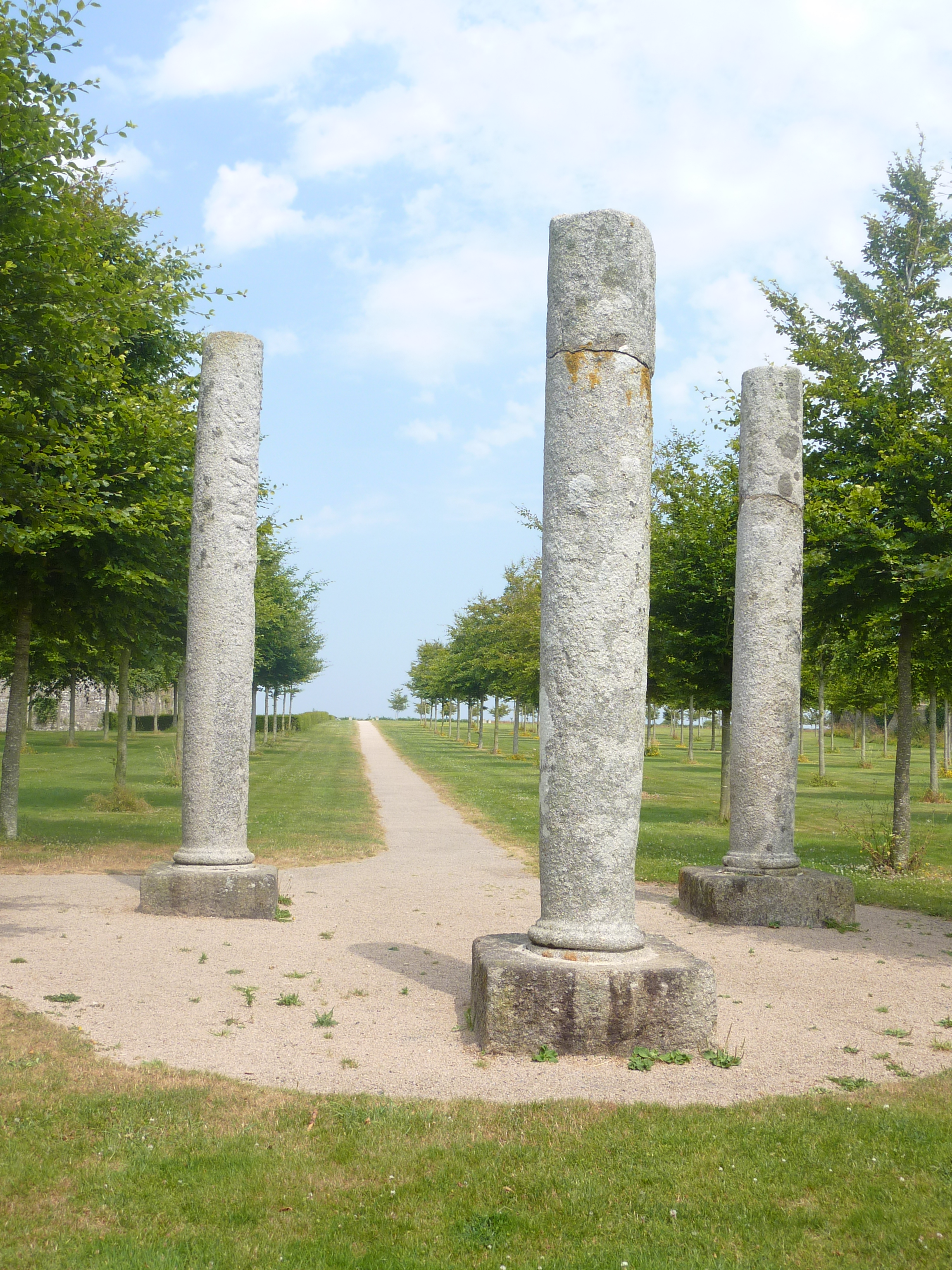 Les piliers de justice ou fourches patibulaires du château de Kerjean, situés à l'origine aux abords du bois jouxtant le domaine, dénommé Coat ar justiciou ("Bois des justices") et déplacés désormais près du château. Ils illustrent le droit de haute justice dont disposaient les seigneurs de Kerjean, la condamnation à mort étant effectuée par pendaison)